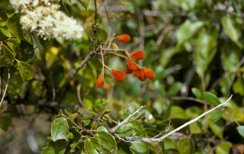 Agelaea pentagyna